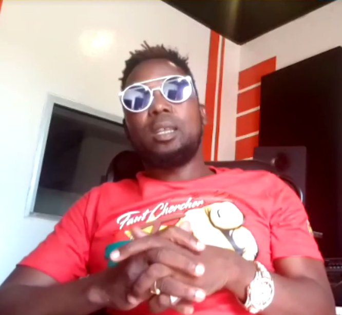 Image extrait du video de la Voice of America.